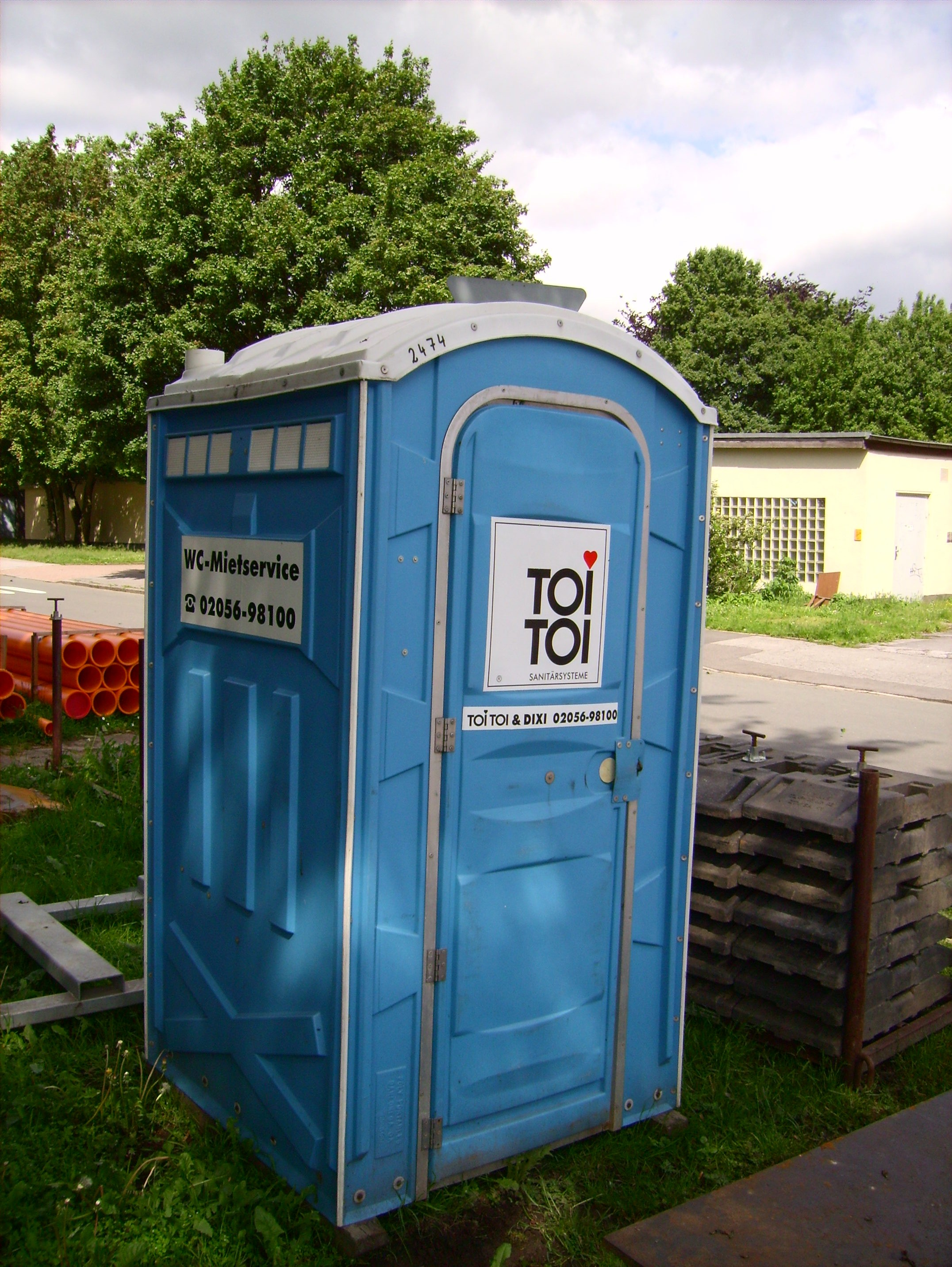 Dixi-Klo